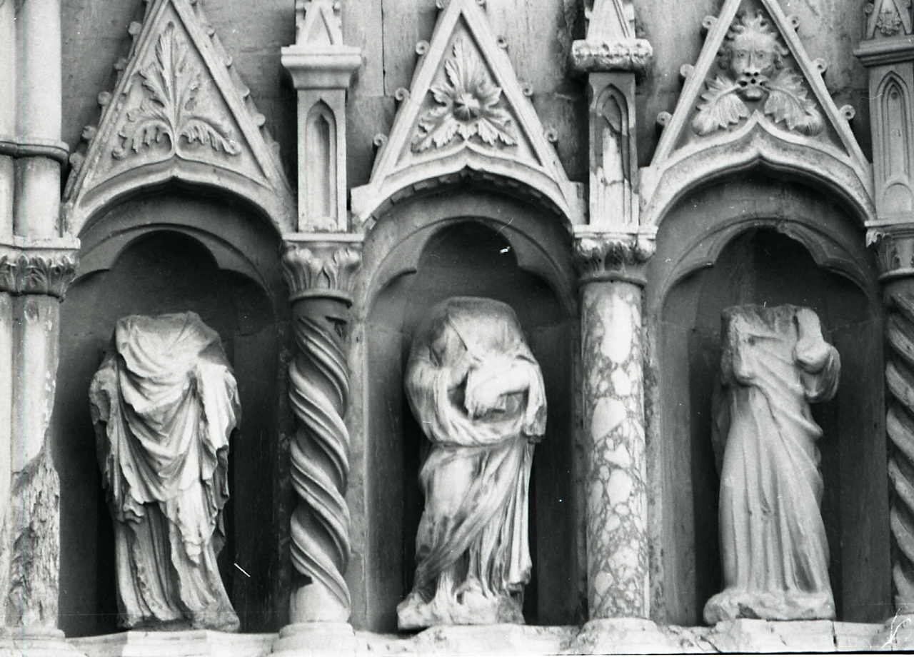 Servizio fotografico : L'Aquila, 1969 / Paolo Monti. - Strisce: 5, Fotogrammi complessivi: 26 : Negativo b/n, gelatina bromuro d'argento/ pellicola ; 35 mm. - ((I fotogrammi hanno una doppia numerazione. . - Sul portanegativi: Nikon Tri-X. - Sul dorso del portanegativi Monti specifica: "Abruzzo.". - Occasione: Documentazione per la pubblicazione: "TOURING CLUB ITALIANO, Abruzzo e Molise, Milano, TCI, 1970". - Fonte: Agenda di Paolo Monti: Monti/ 3 aprile 1966 - 9 marzo 1971/ 12421-16823 (1966-1971), presso Archivio Paolo Monti. - Fonte: Monografia: TOURING CLUB ITALIANO, Abruzzo e Molise, Milano, TCI, 1970 (1970)